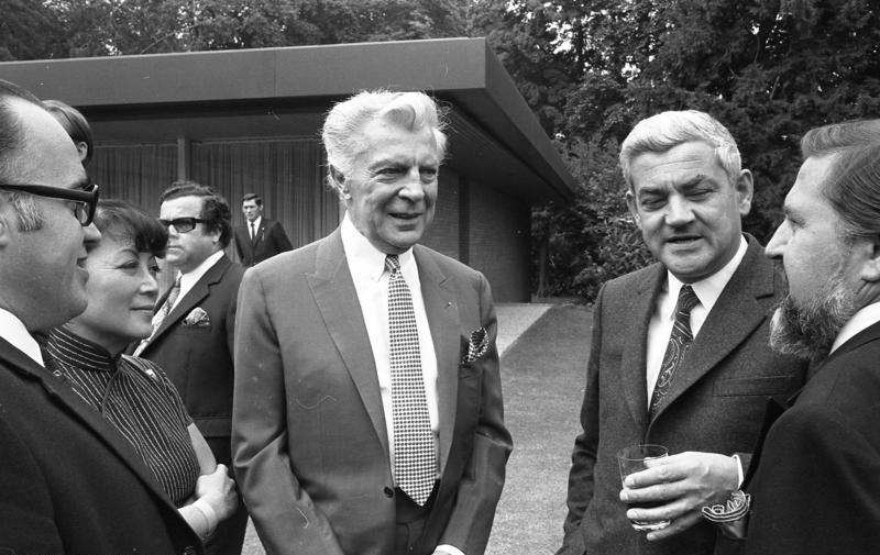 Bundeskanzler Willy Brandt empfängt Filmschauspieler